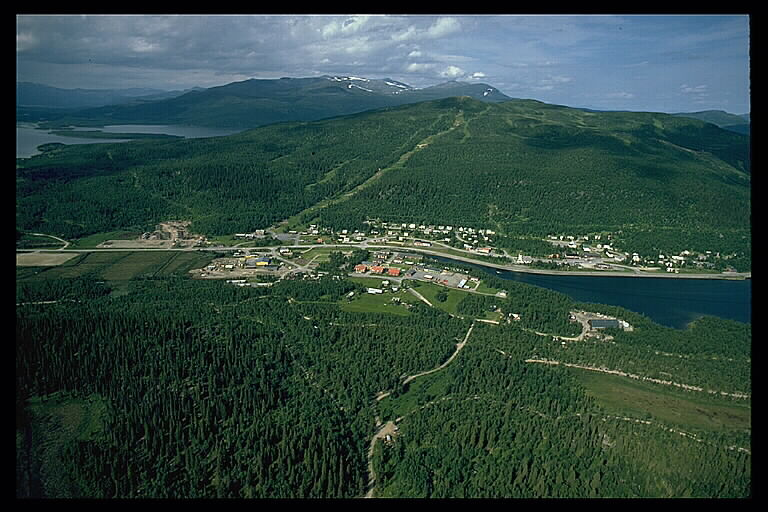 Bilden troligen från slutet av 1970-talet.; Fjällbygd; Miljöer; Odlingslandskap